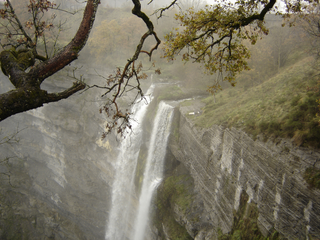 Goiuriko ur-jauzia (Urkabustaiz, Araba).